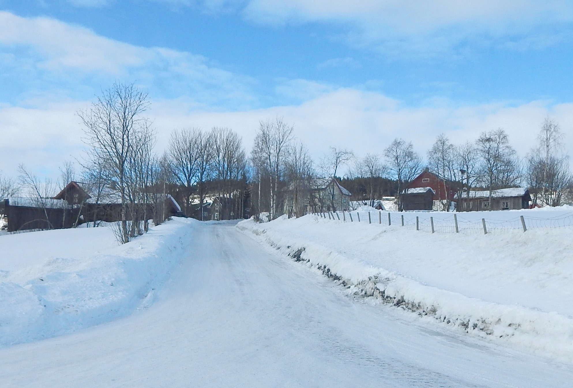 Lishøgdvegen (fylkesvei 2542, tidl. 336)